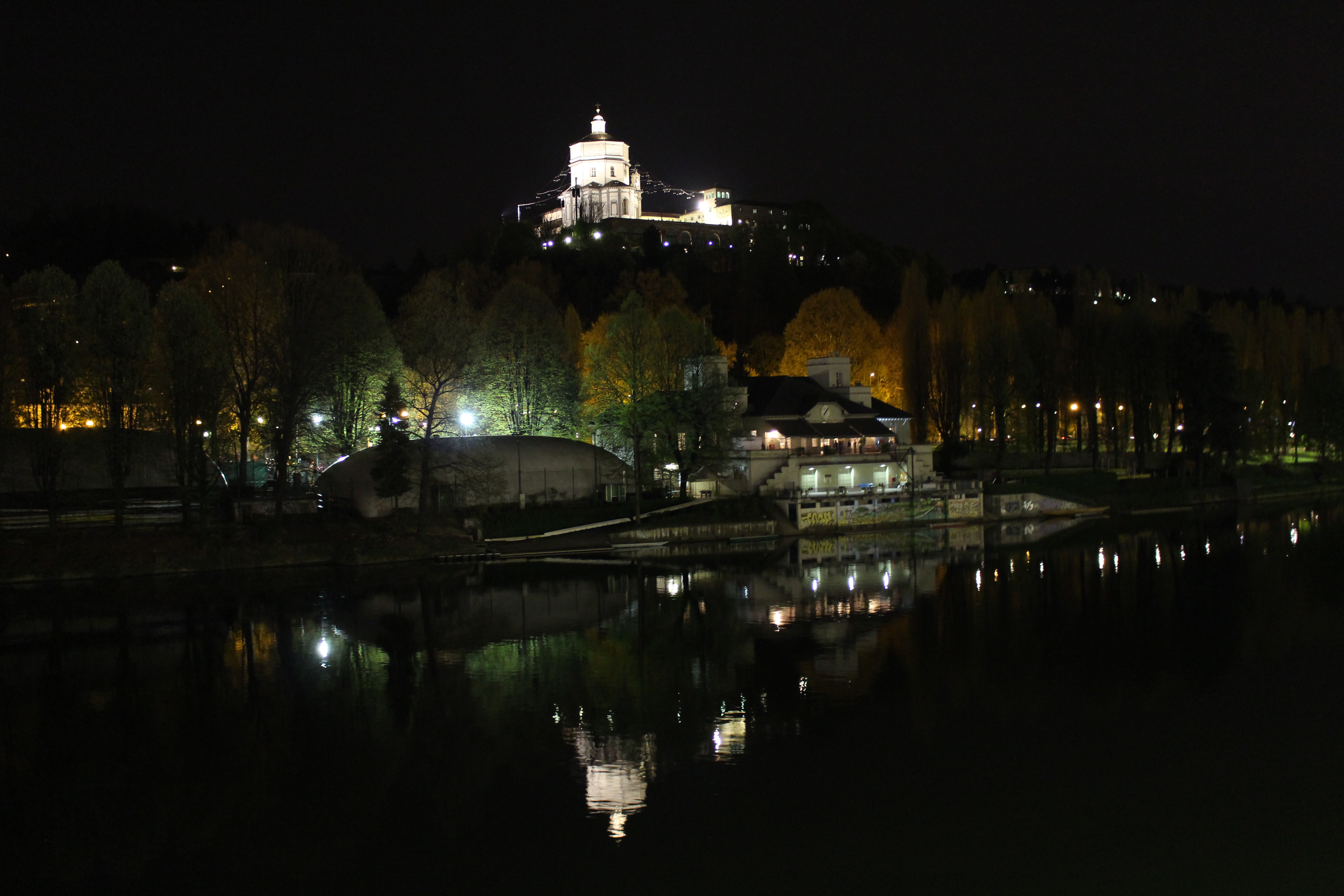 Il Monte dei Cappuccii visto dai Murazzi del Po